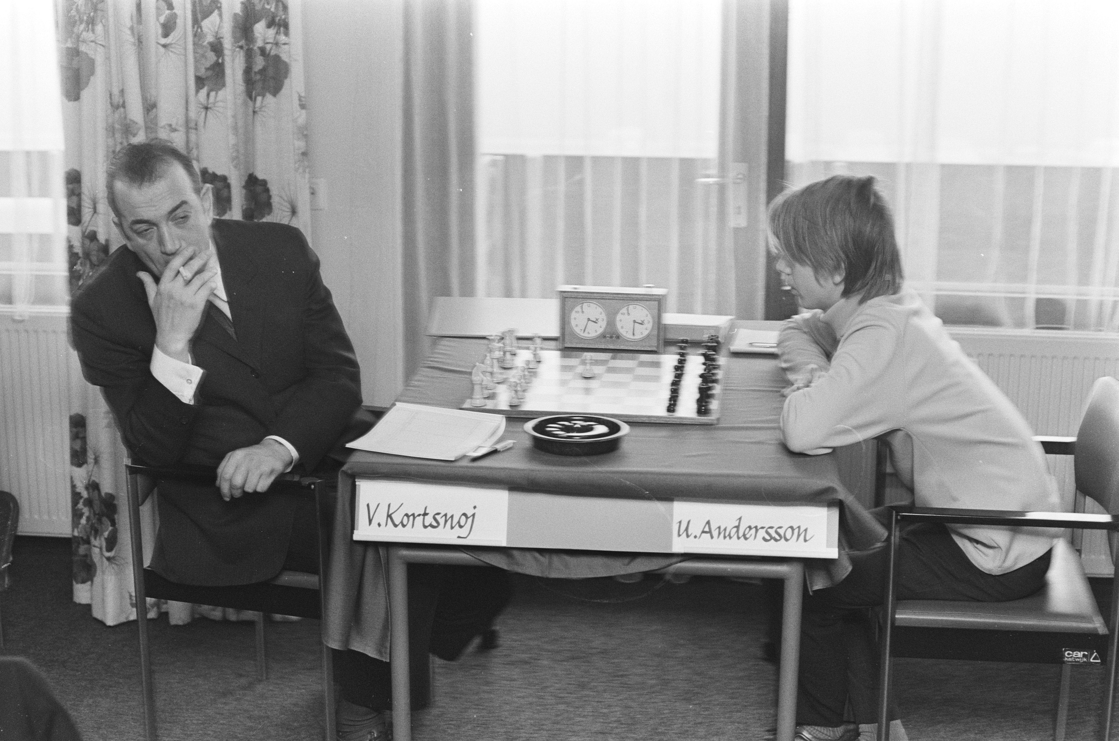 Collectie / Archief : Fotocollectie Anefo Reportage / Serie : [ onbekend ] Beschrijving : Hoogovenschaaktoernooi, Wijk aan Zee; Kortsnoj (links) zit er verveeld bij tegen Andersson Datum : 13 januari 1971 Locatie : Noord-Holland, Wijk aan Zee Trefwoorden : schaken Persoonsnaam : Andersson, Kortsjnoi, Viktor Fotograaf : Verhoeff, Bert / Anefo Auteursrechthebbende : Nationaal Archief Materiaalsoort : Negatief (zwart/wit) Nummer archiefinventaris : bekijk toegang 2.24.01.05 Bestanddeelnummer : 924-1699